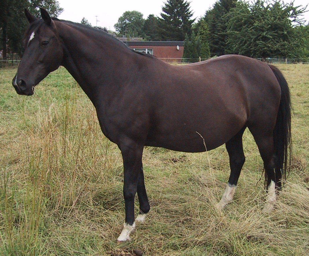 Tragende Oldenburger Stute